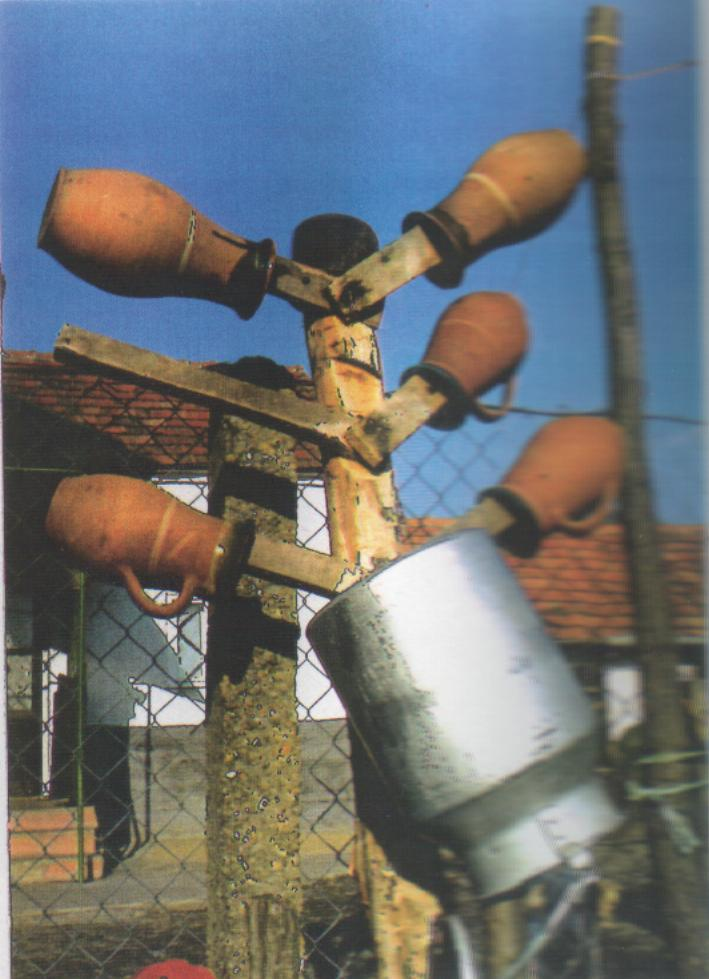 Köcsögfa Rábapatonán